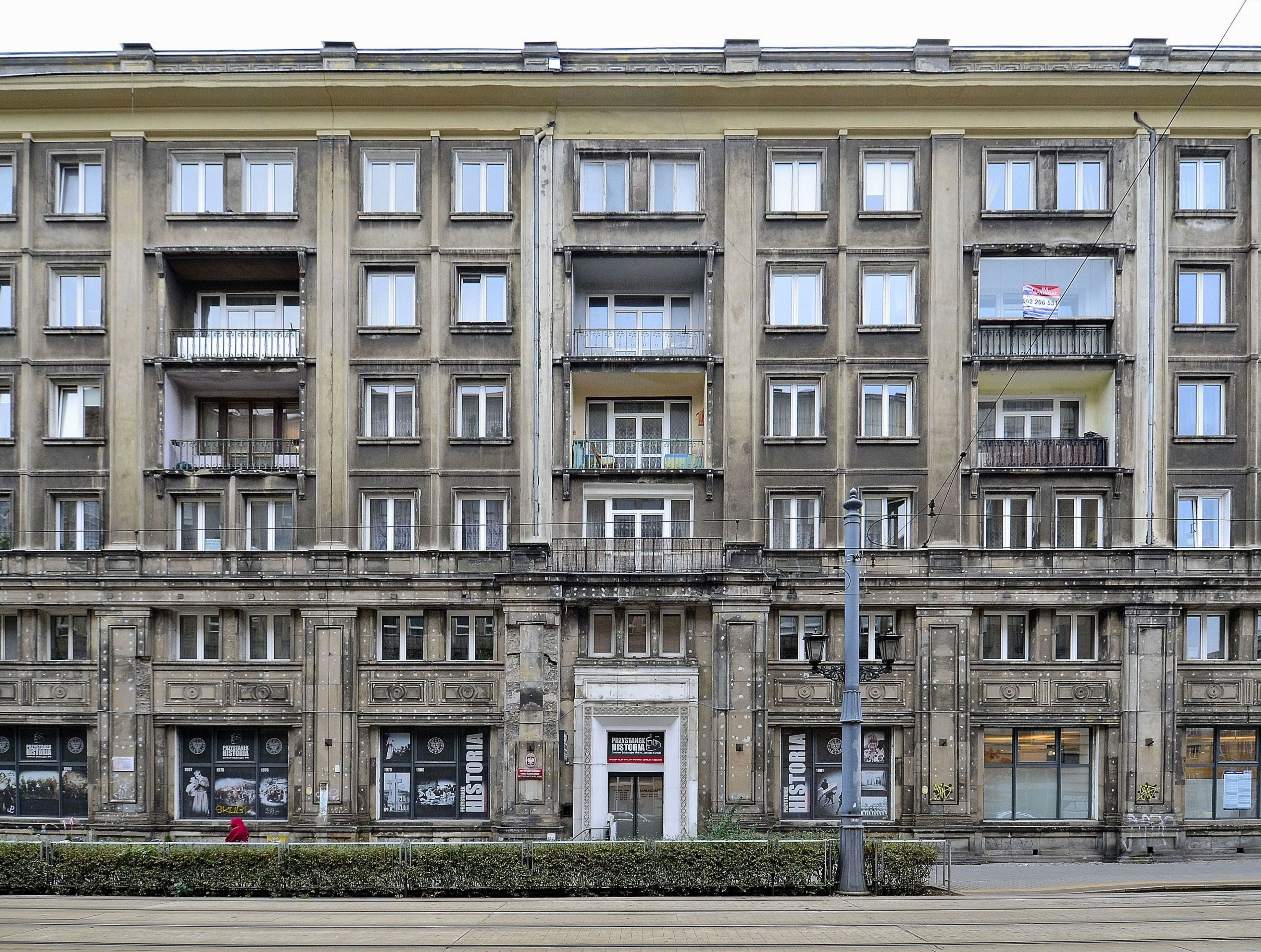 Przystanek Historia. Centrum Edukacyjne IPN im. Janusza Kurtyki przy ul. Marszałkowskiej 21/25 w Warszawie